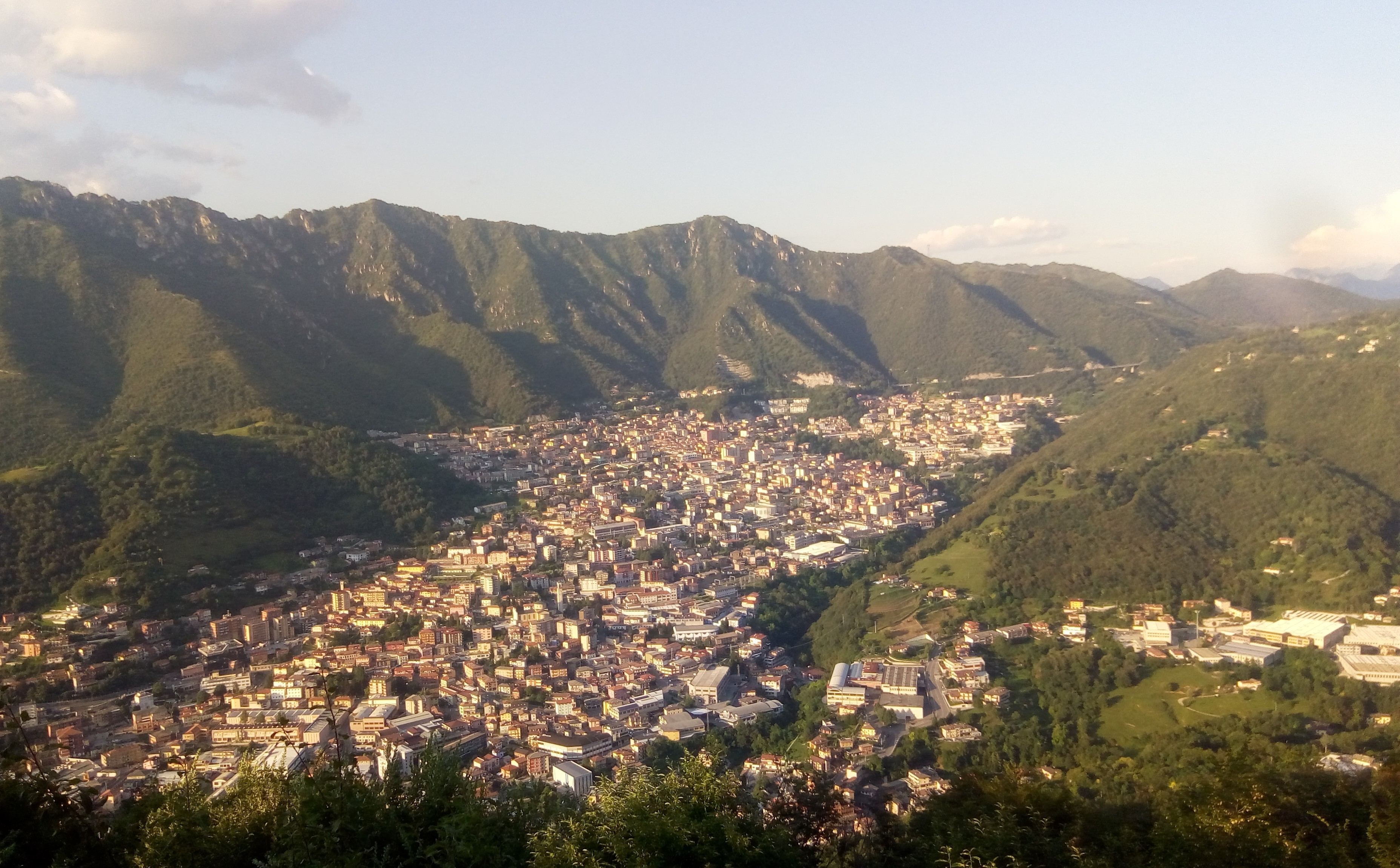 foto di Lumezzane dalle montagne